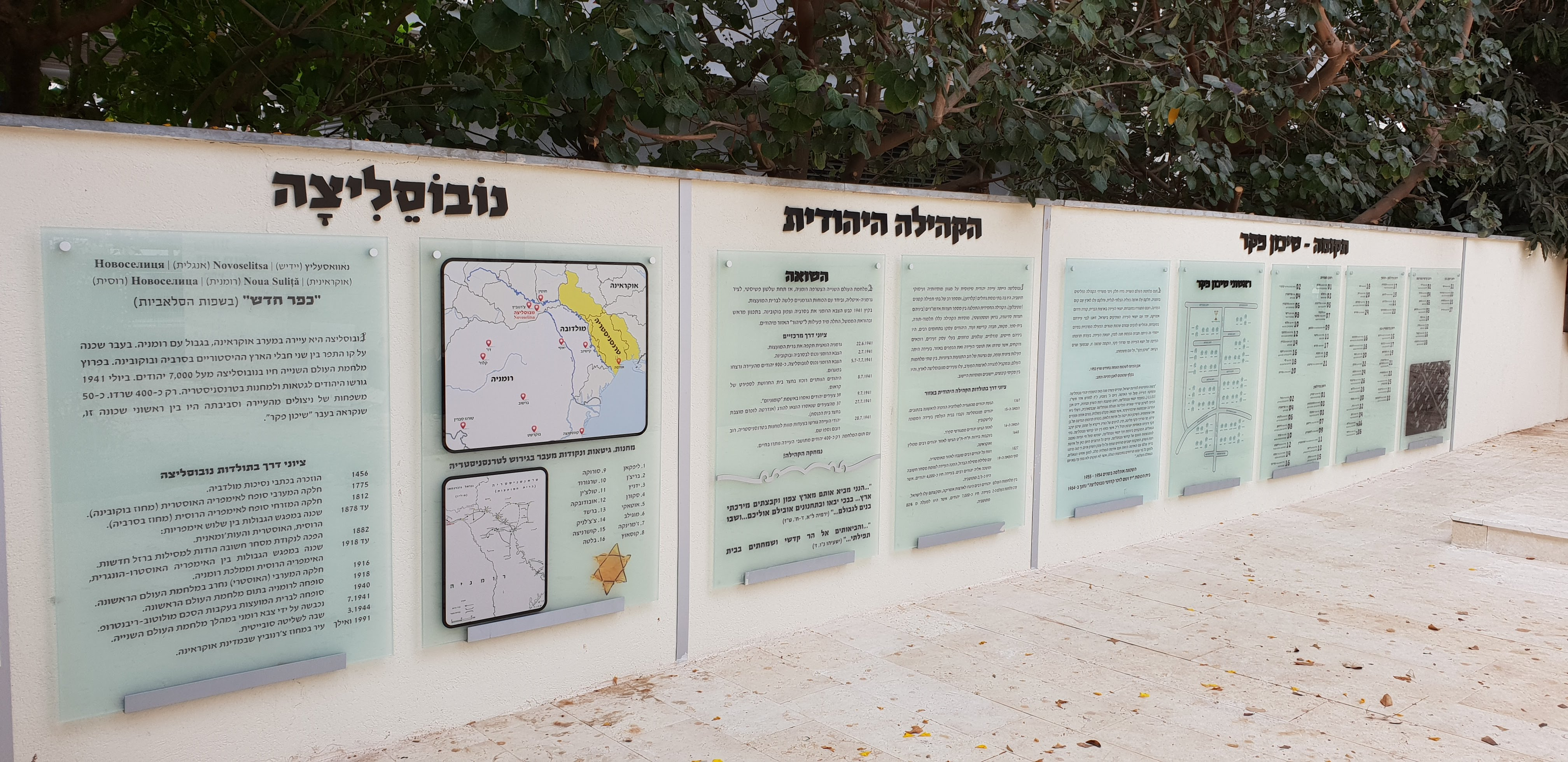 קיר מורשת יהודי נובוסליצה וראשוני שיכון פקר ברמת השרון